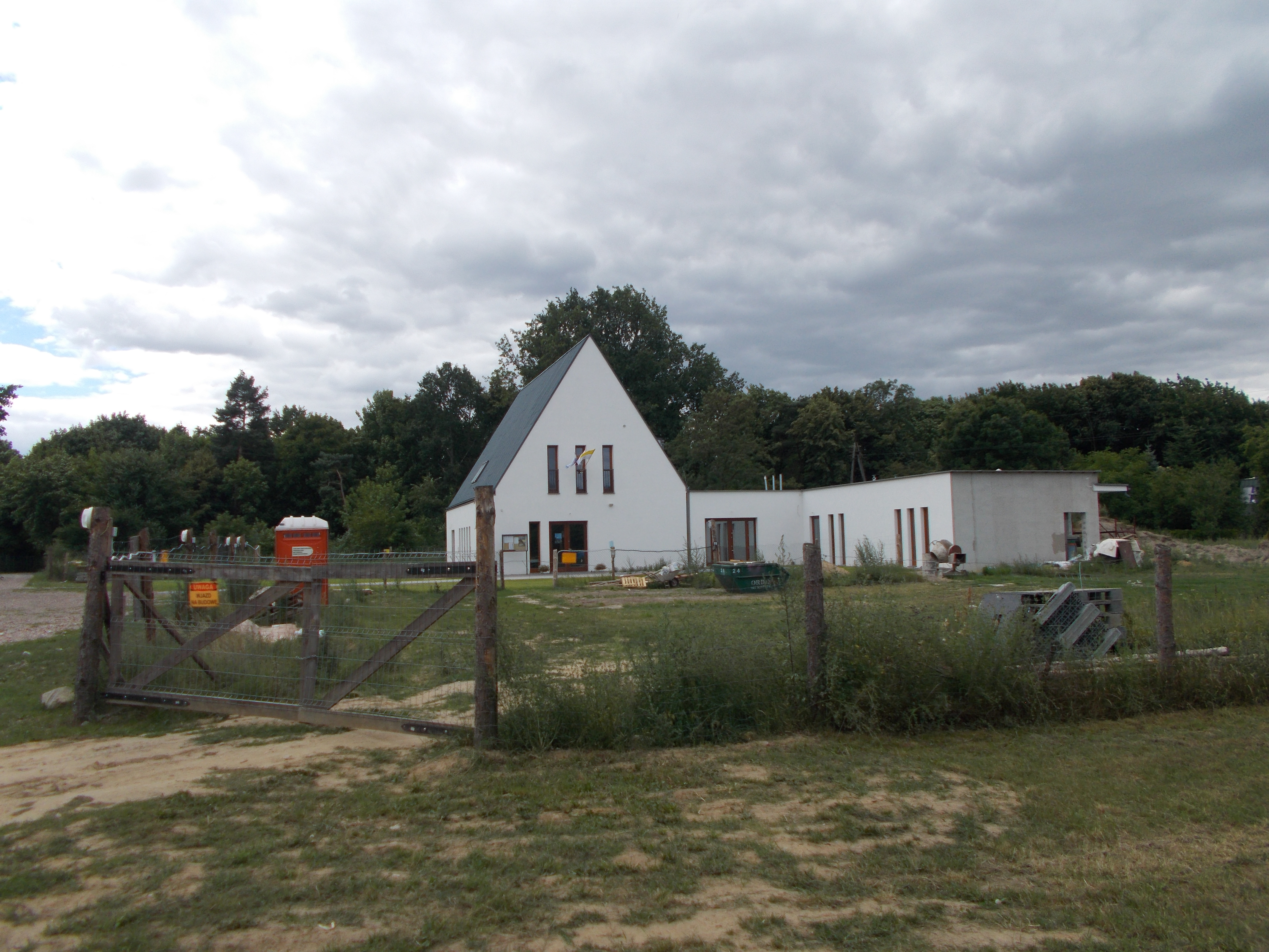 Plac budowy zespołu sakralnego przy parafii pw. św. Moniki w Poznaniu. W tle dom parafialny.